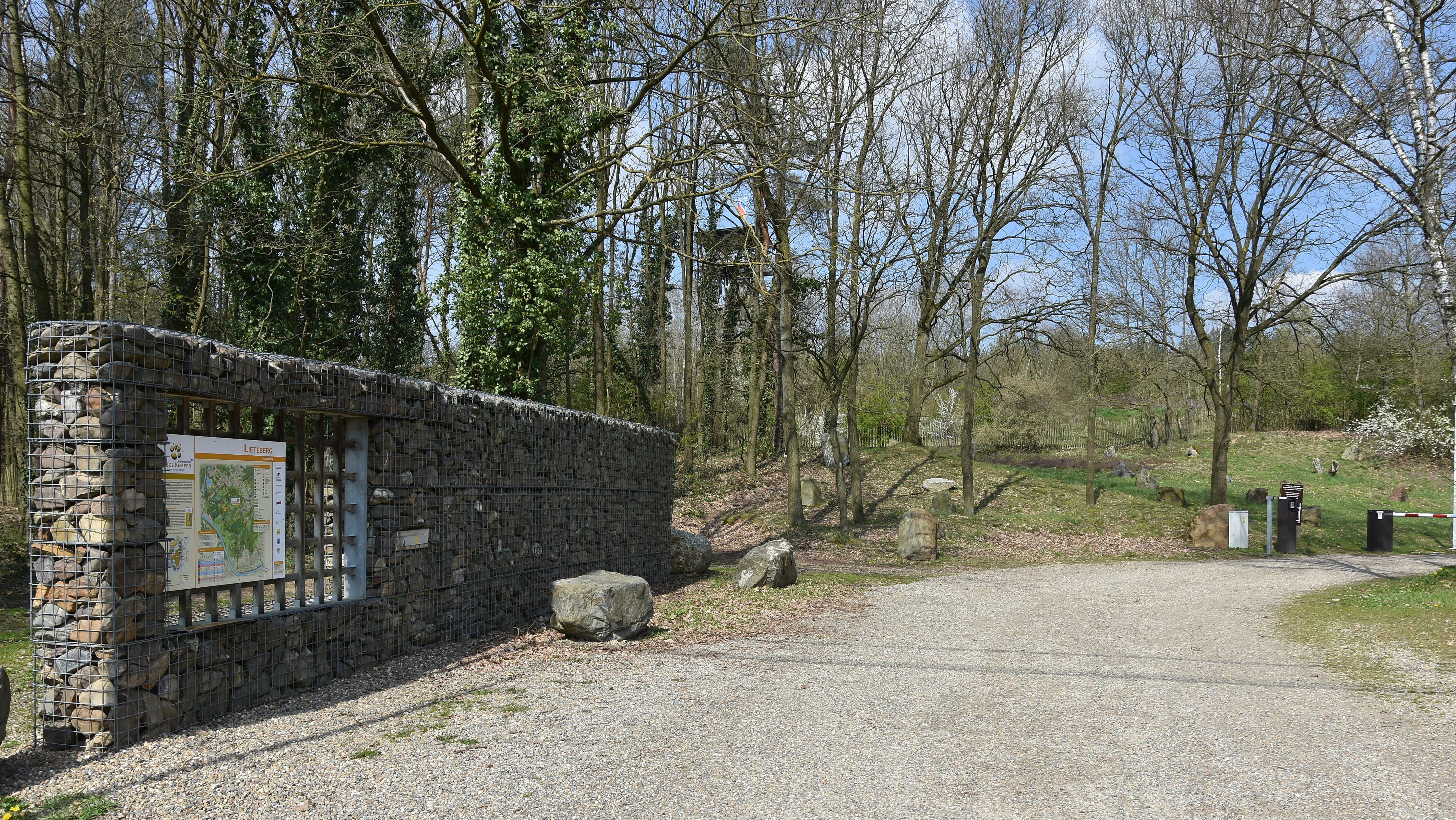 Poort Lieteberg Nationaal Park Hoge Kempen 5-04-2019 12-01-14